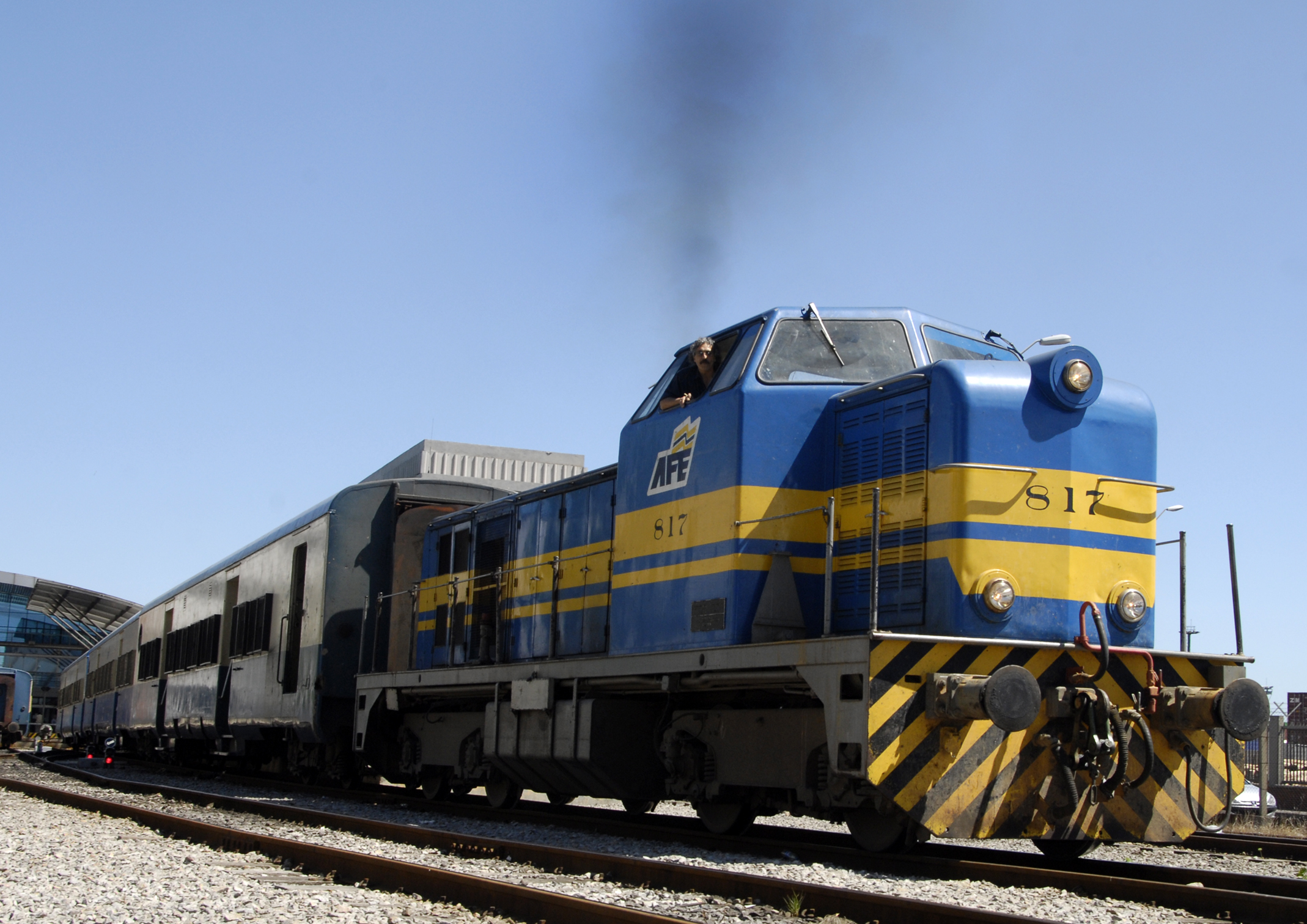 Tren de AFE.